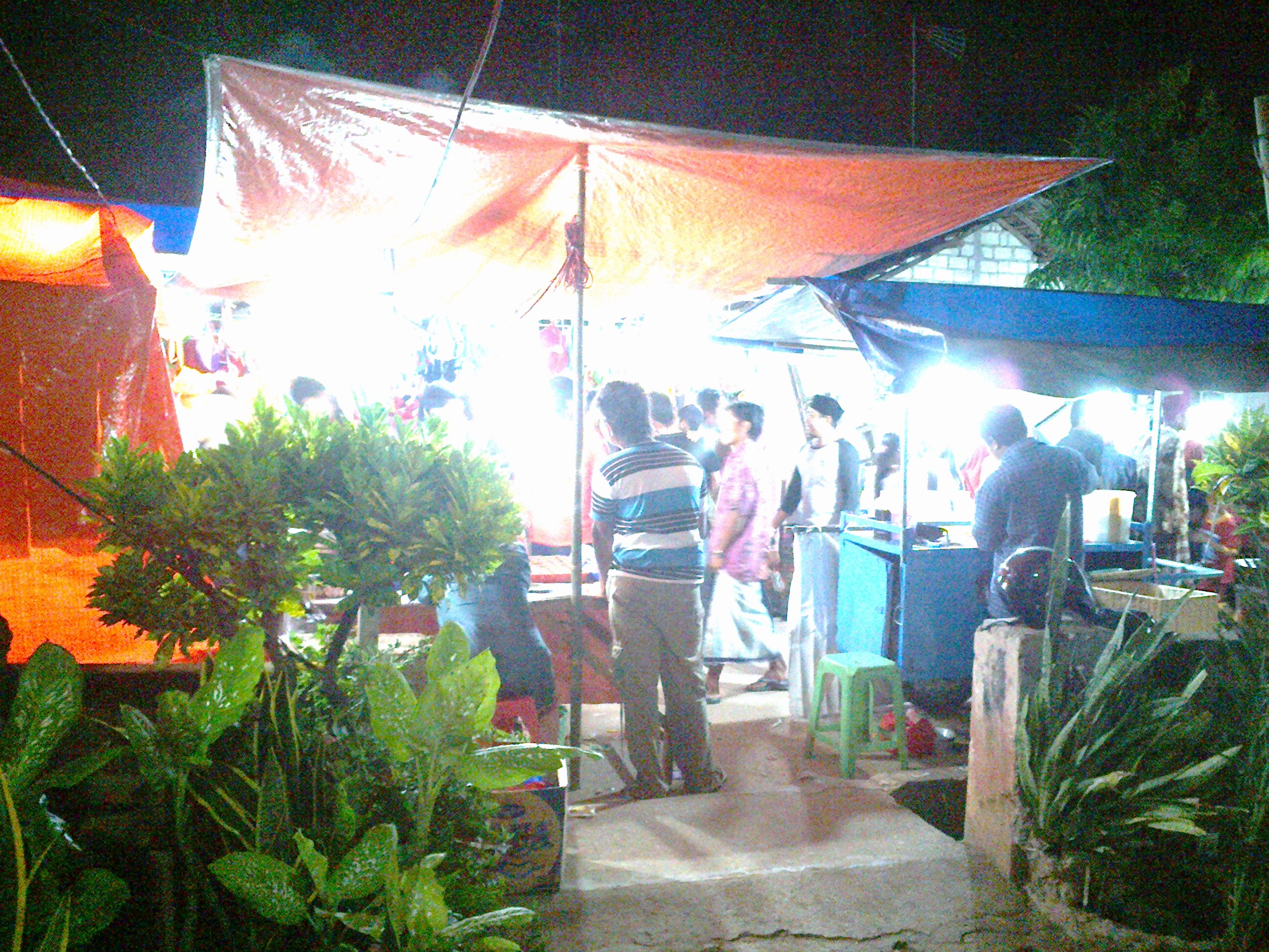 Suasana Malam Hari